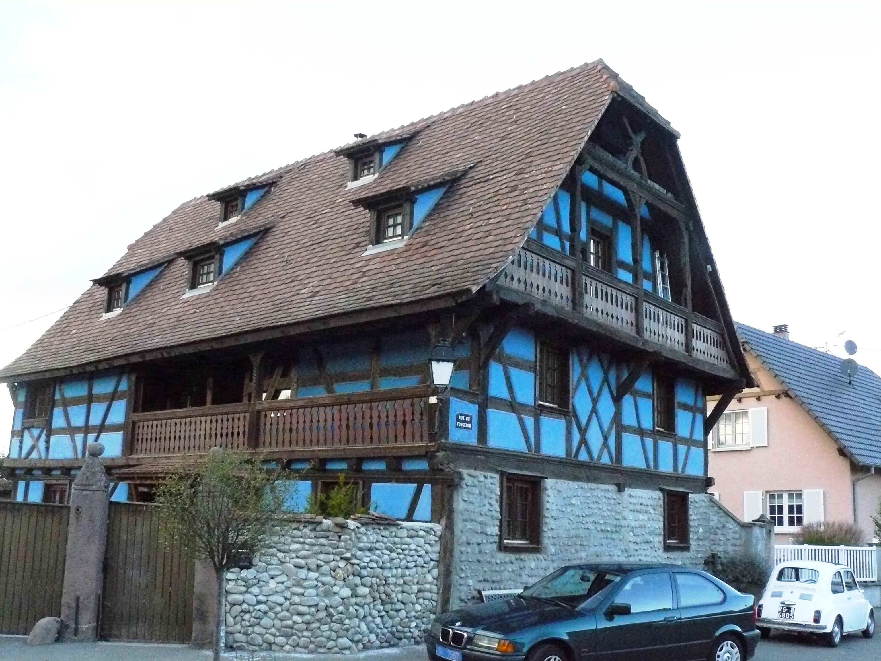 Maison en pan de bois (XVIIIe)